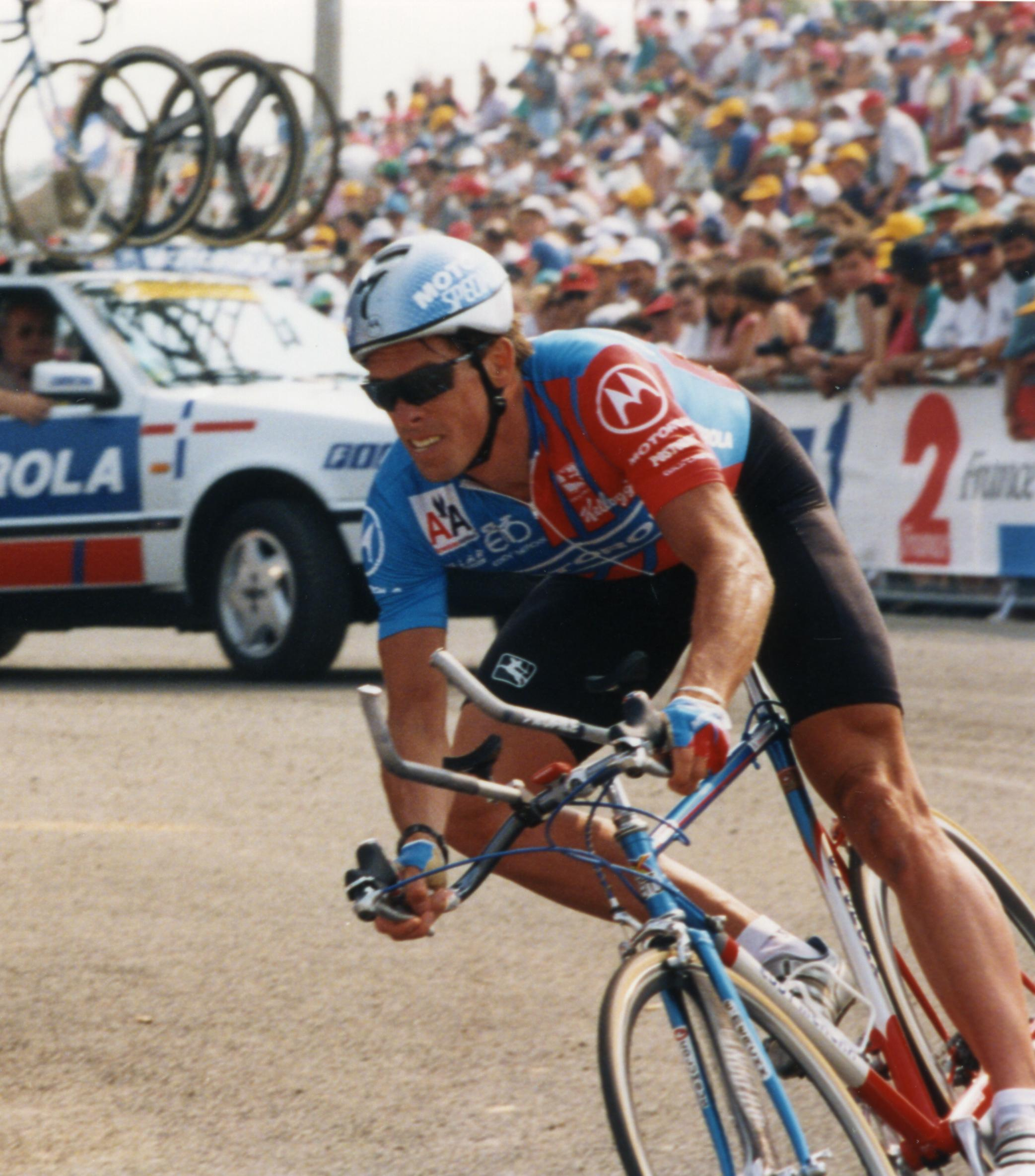 TOUR DE FRANCE 1993